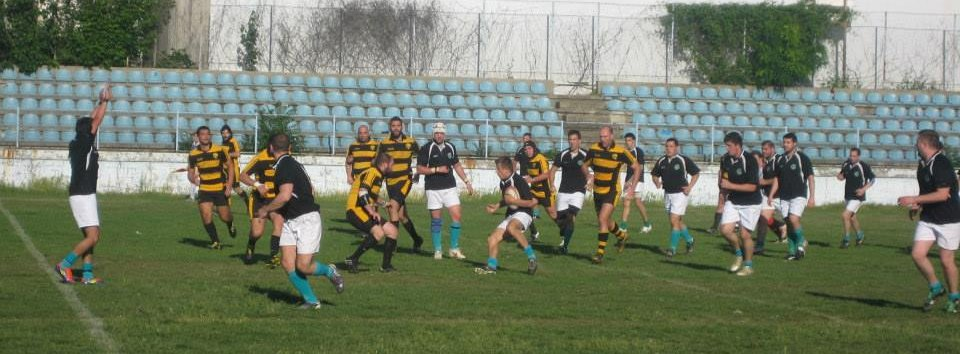 Photos from the Komarac-Lions match in Belgrade